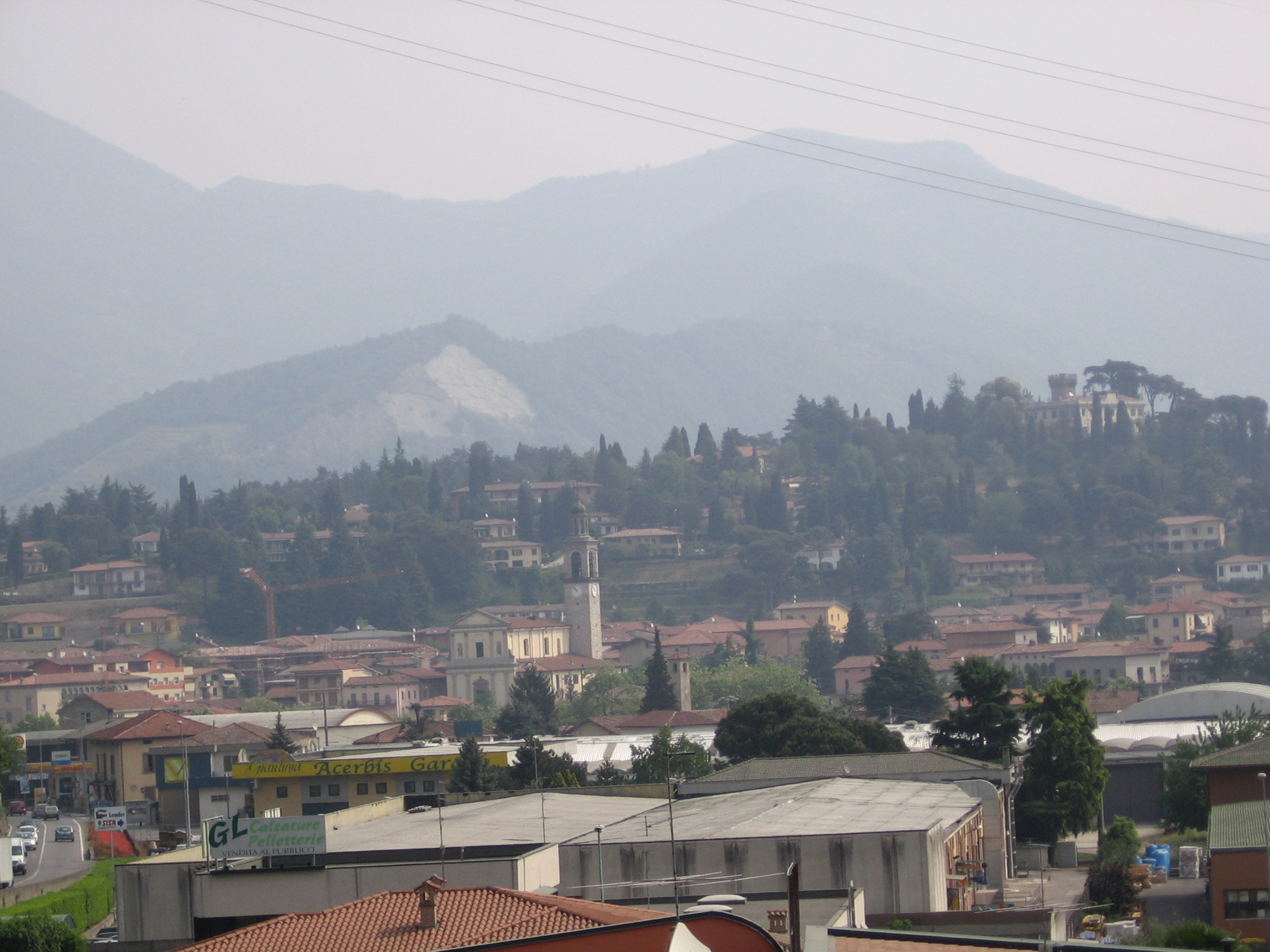 Credaro, Bergamo, Italia